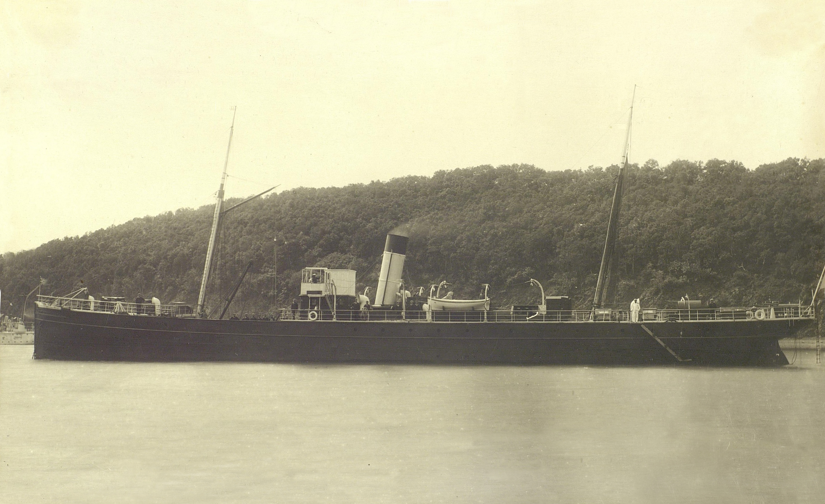 Транспорт Сибирской военной флотилии "Якут"